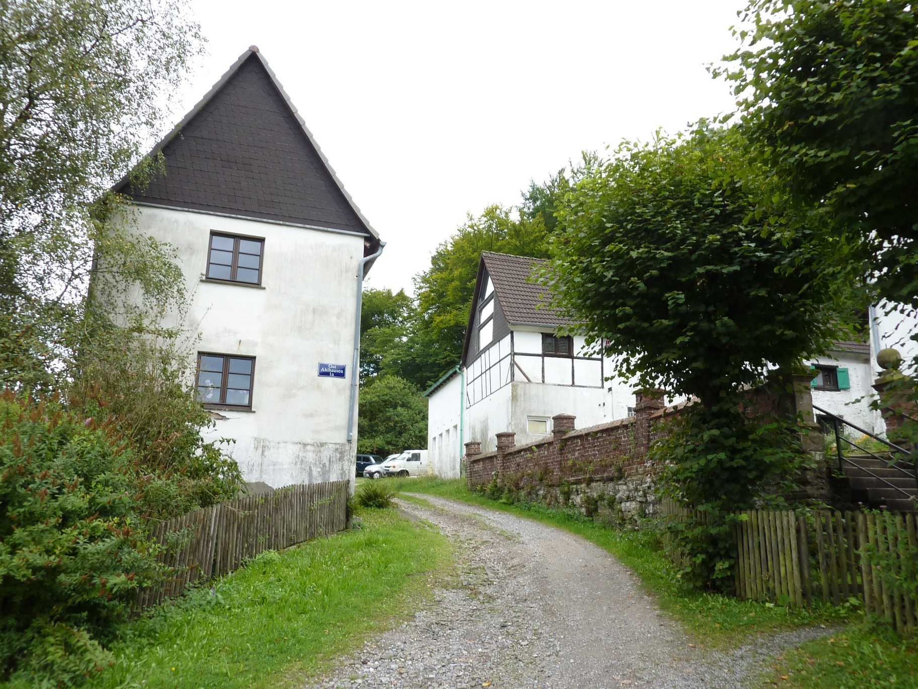 Durchgang durch Gut Ahlhausen an der EnnepeThis is a photograph of an architectural monument., no. 0